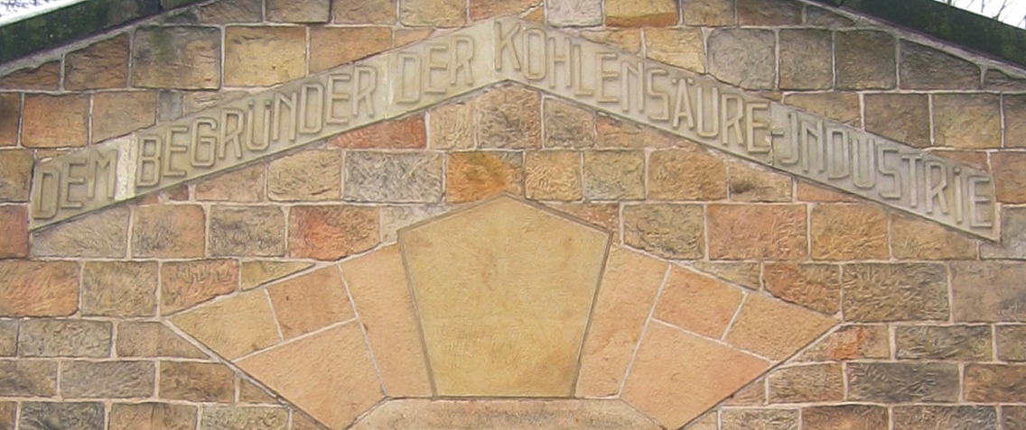 Inschrift „Dem Begründer der Kohlensäure-Industrie“ am Carl-Gustav-Rommenhöller-Denkmal bei Herste in Bad Driburg, Deutschland.